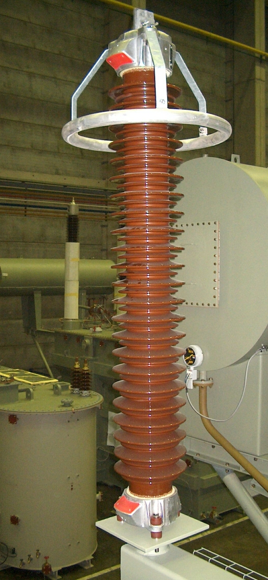 Een hoogspannings-overspanningsafleider, gemonteerd op een steun op een vermogenstransformator in de transformatorfabriek Pauwels Trafo Mechelen, België